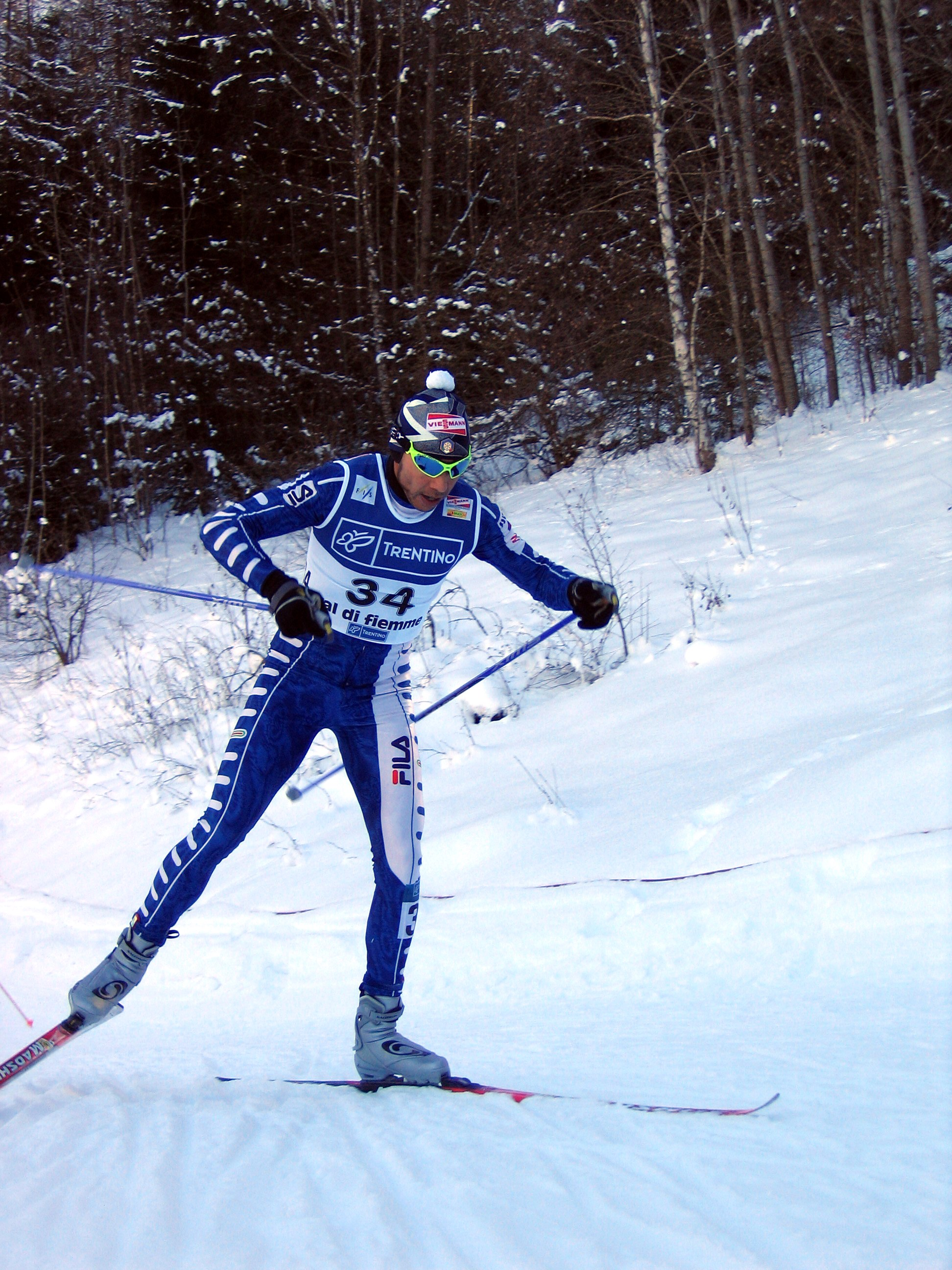 Italian skier Cristian Zorzi.